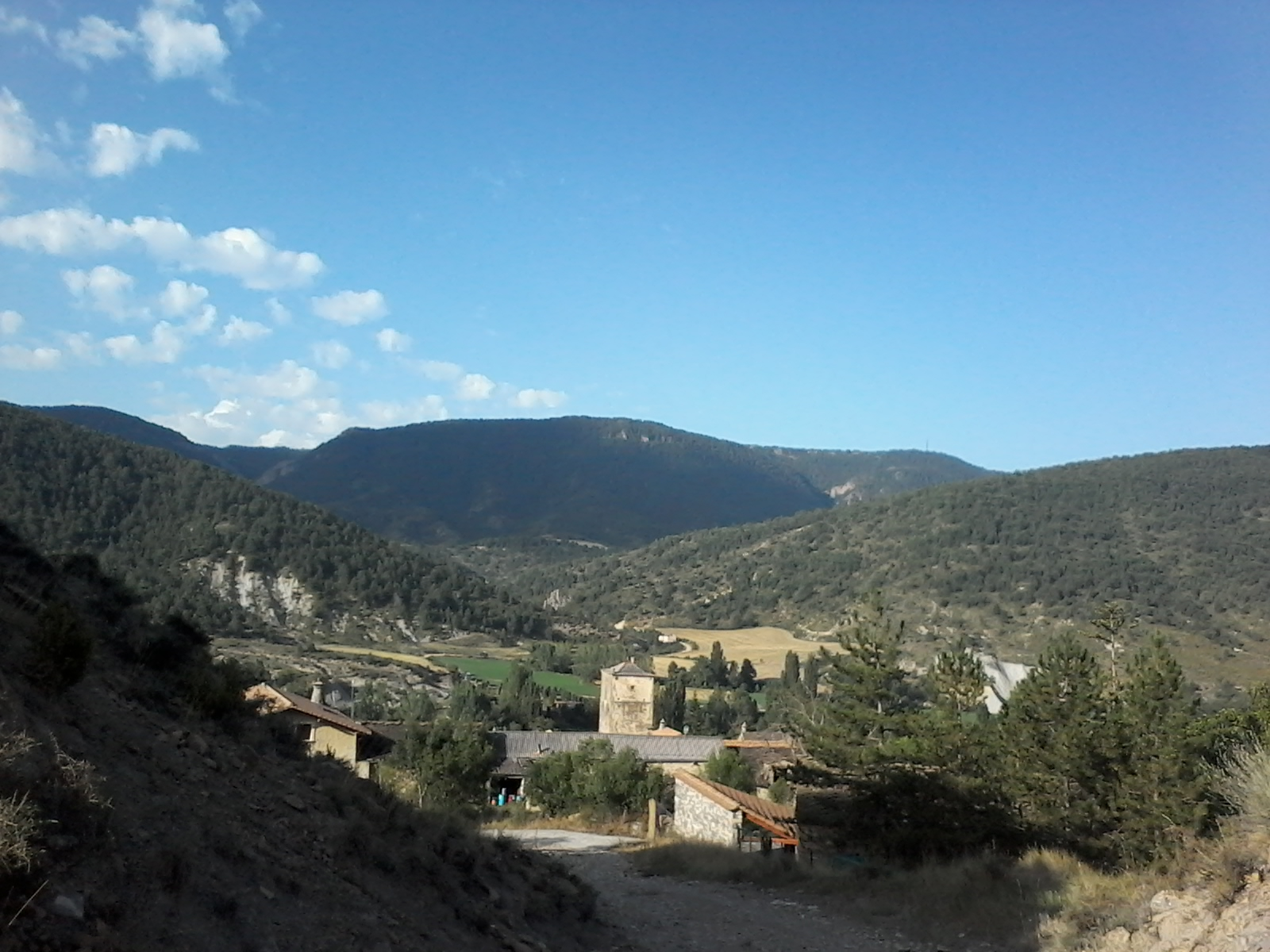 Atarés, Huesca, España